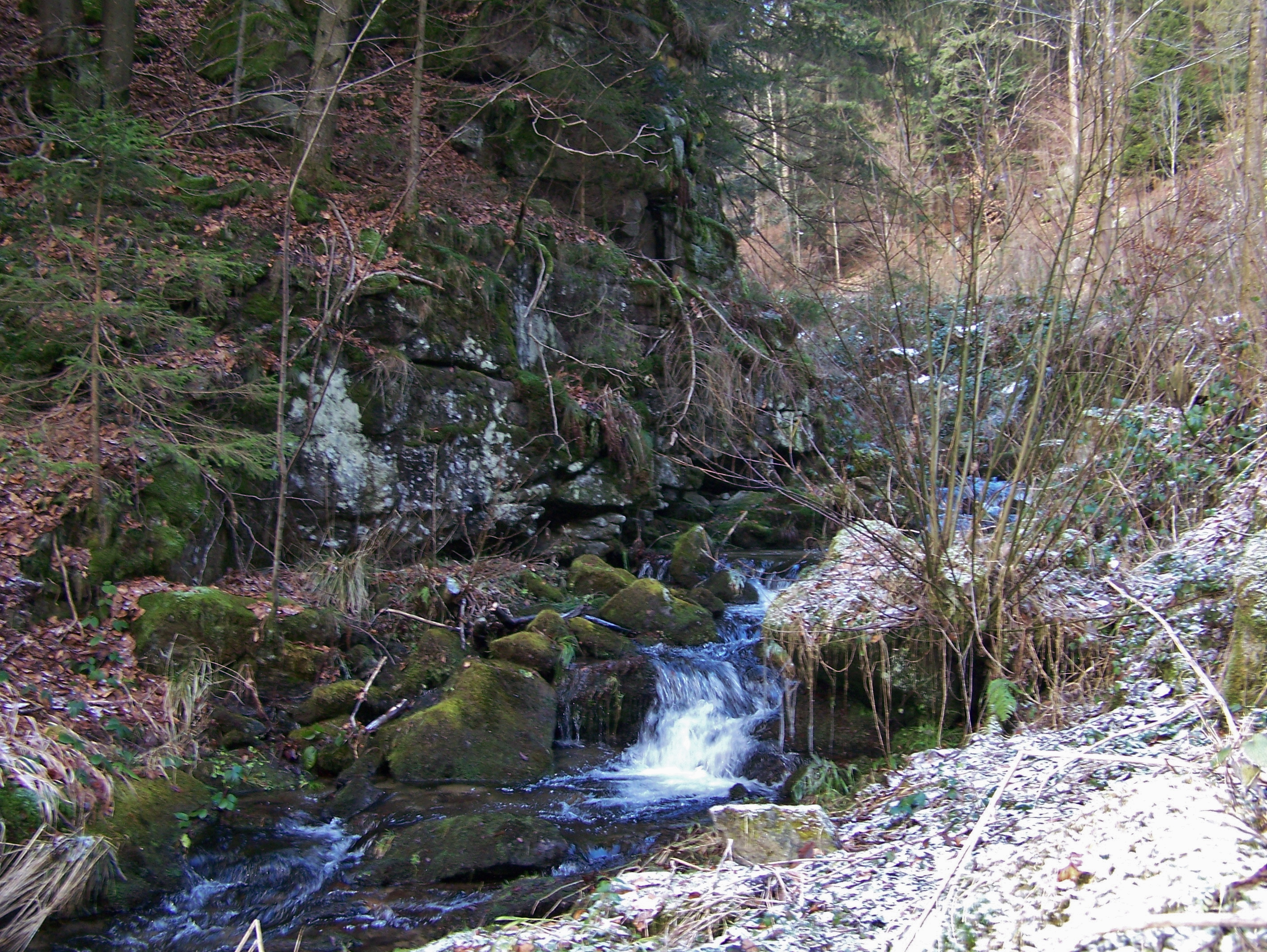 Bachlauf durch die Saulochschlucht